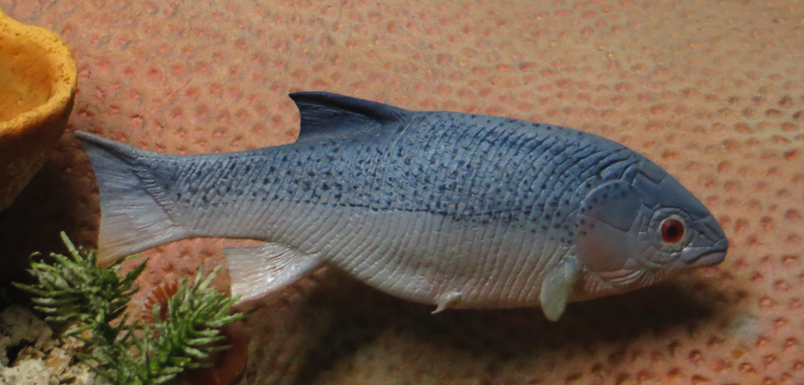 Took the picture at Museum Mensch und Natur, Munchen